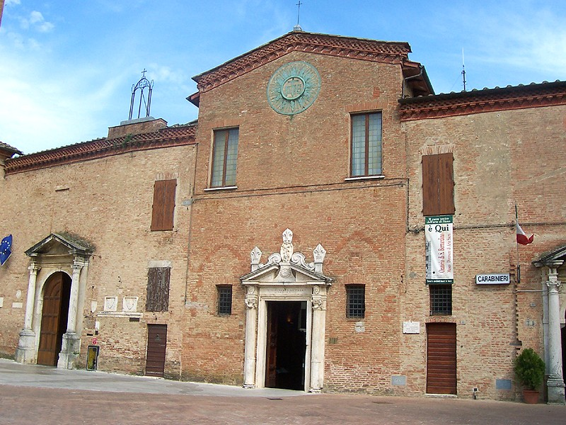 Siena - Oratorio di S. Bernardino